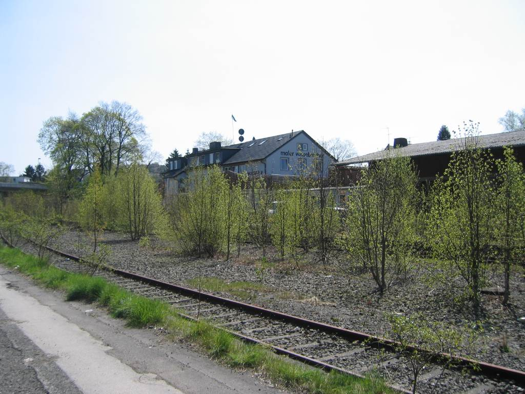 Beschreibung: Eisenbahn in Wipperfürth Fotograf: JensD Aufgenommen: 2005